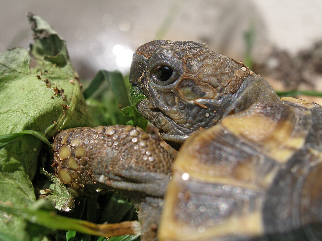 Želva zelenavá